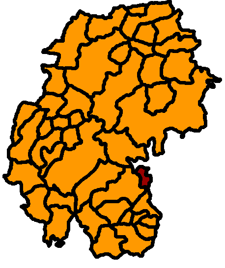 Pennewitz hervorgehoben, Ilm-Kreis